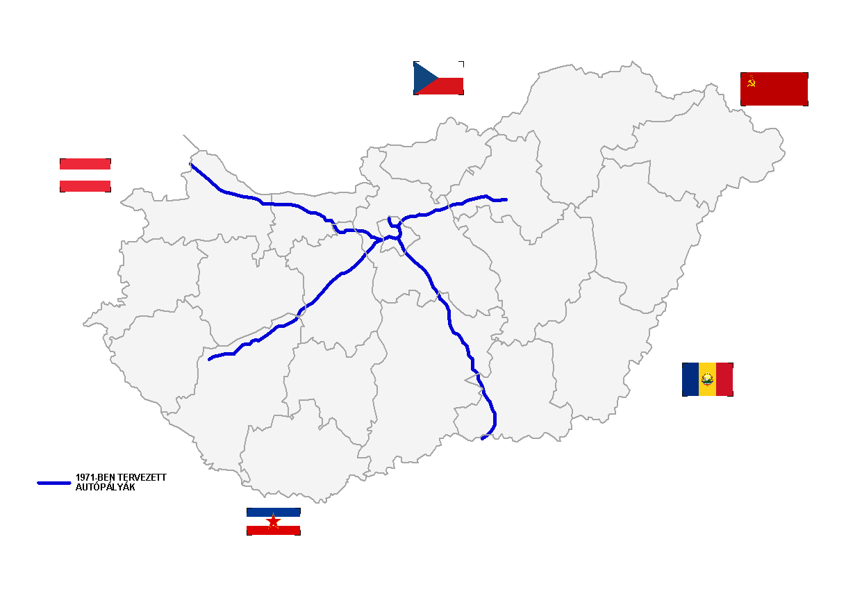 Magyarország tervezett autópályái a 3073/1971 Miniszter Tanácsi rendelet szerint